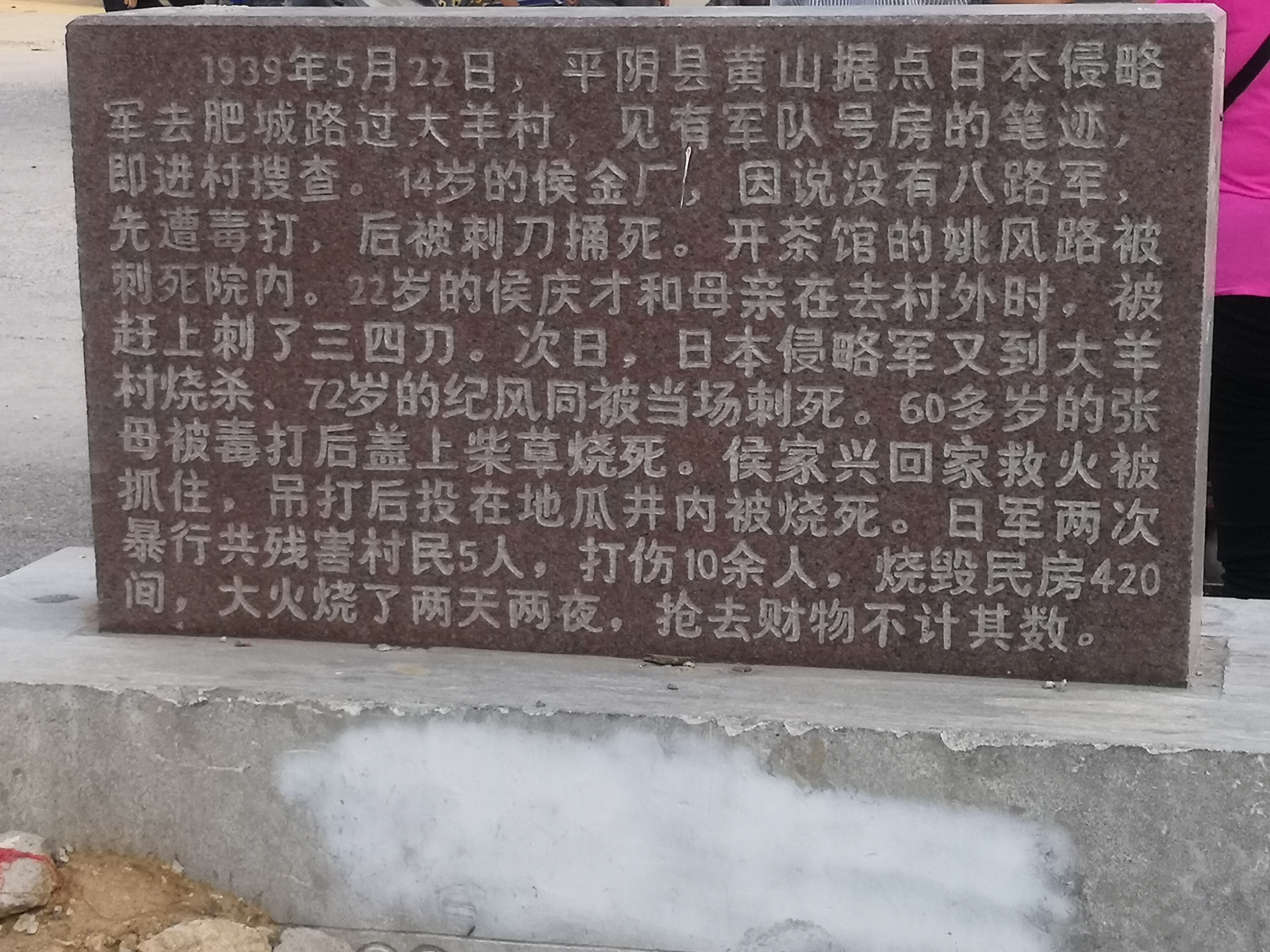 中文（中国大陆）: 大羊惨案纪念碑 背面。记录了惨案的大致过程。